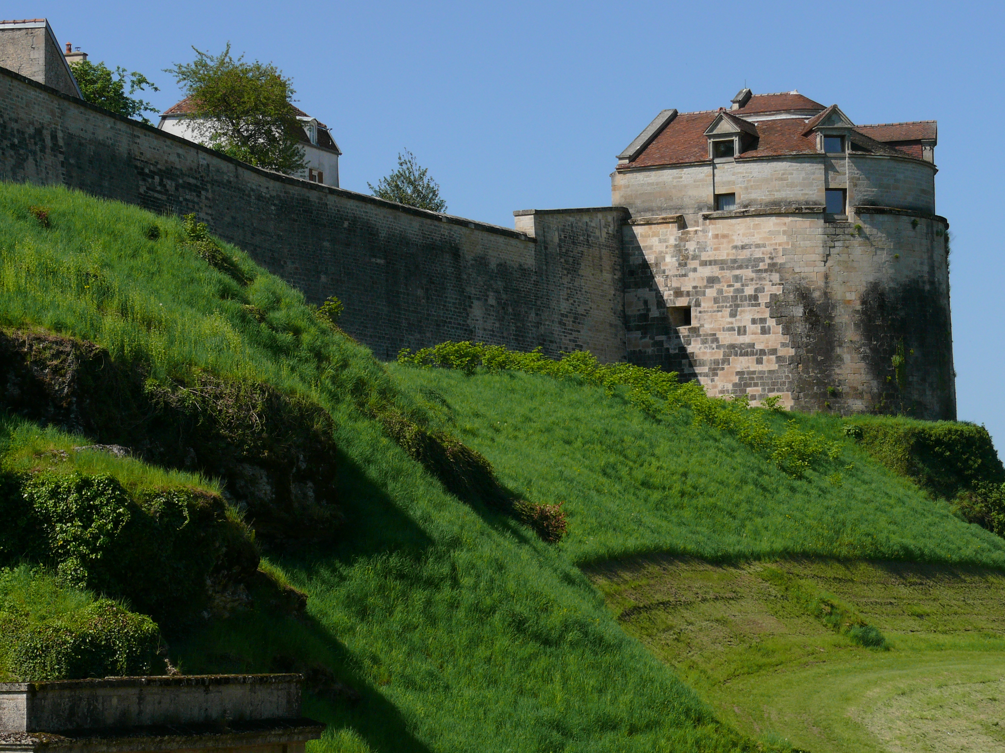 Langres - Tour Saint-Jean